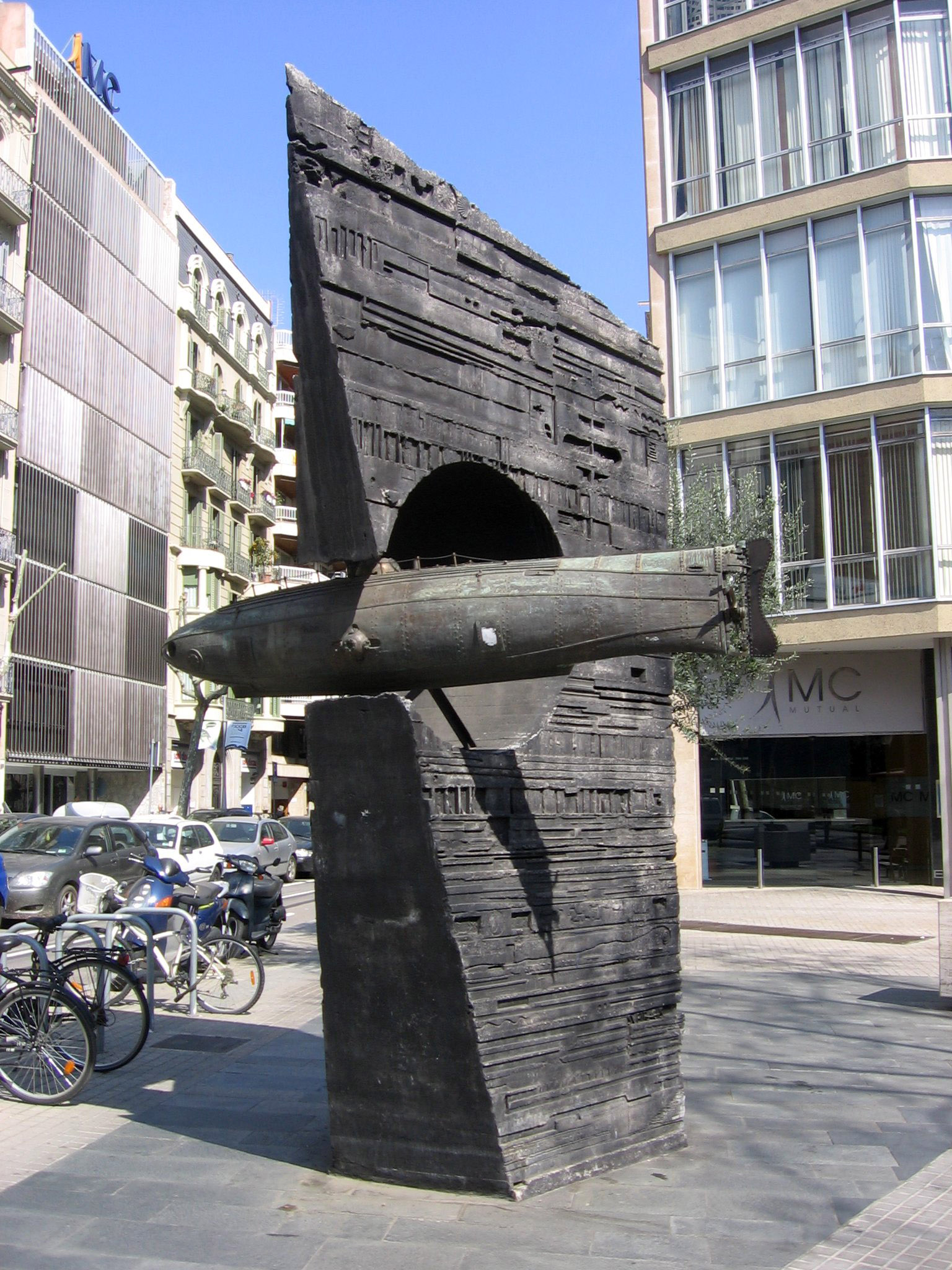 Monumento a Narcís Monturiol (1963), de Josep Maria Subirachs, Barcelona.